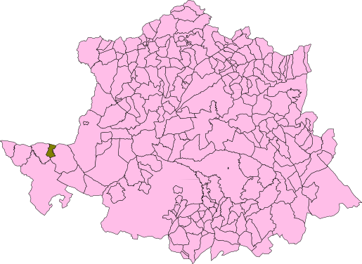 Carbajo